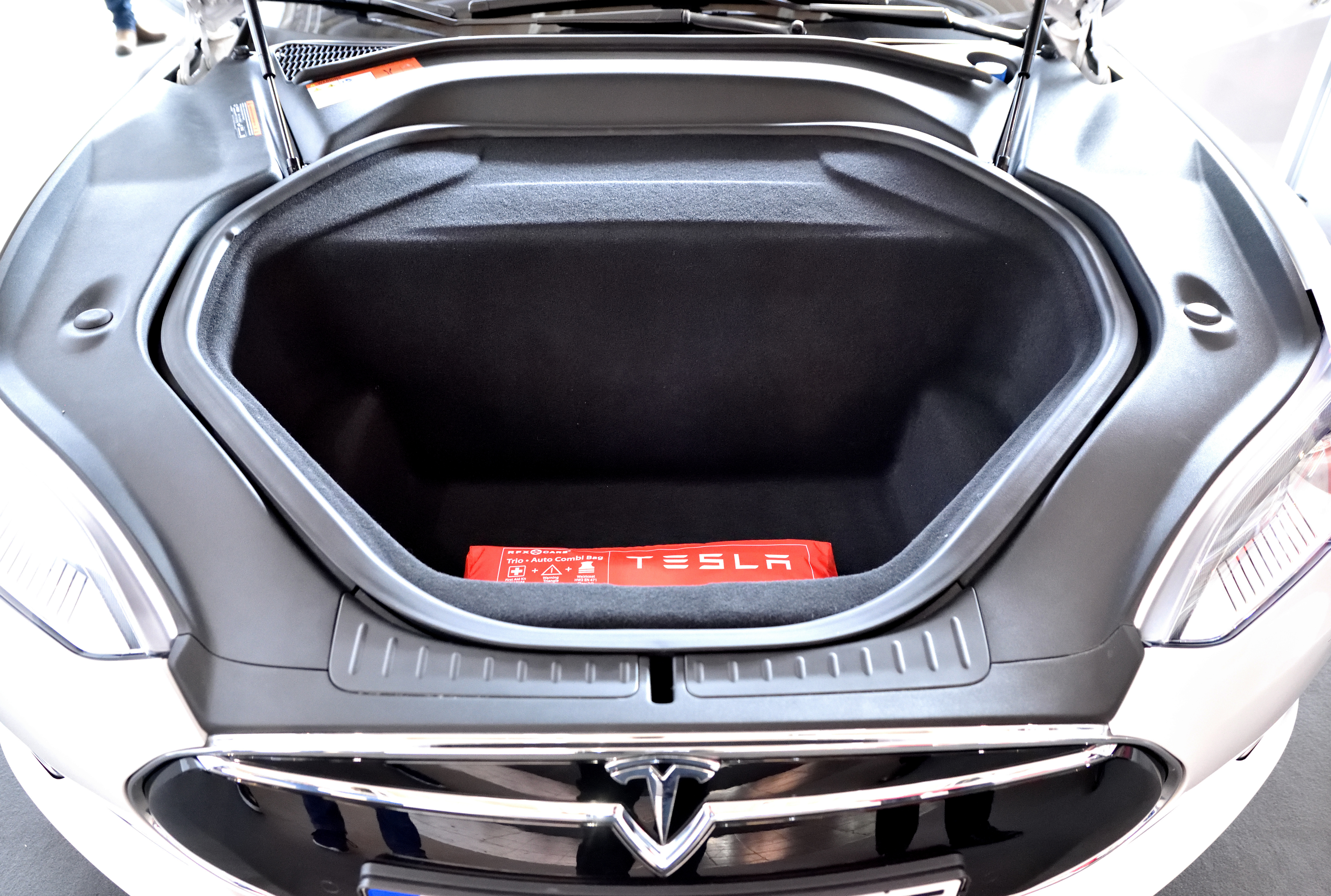 Tesla Model S P90D auf der CeBIT 2016 in Hannover